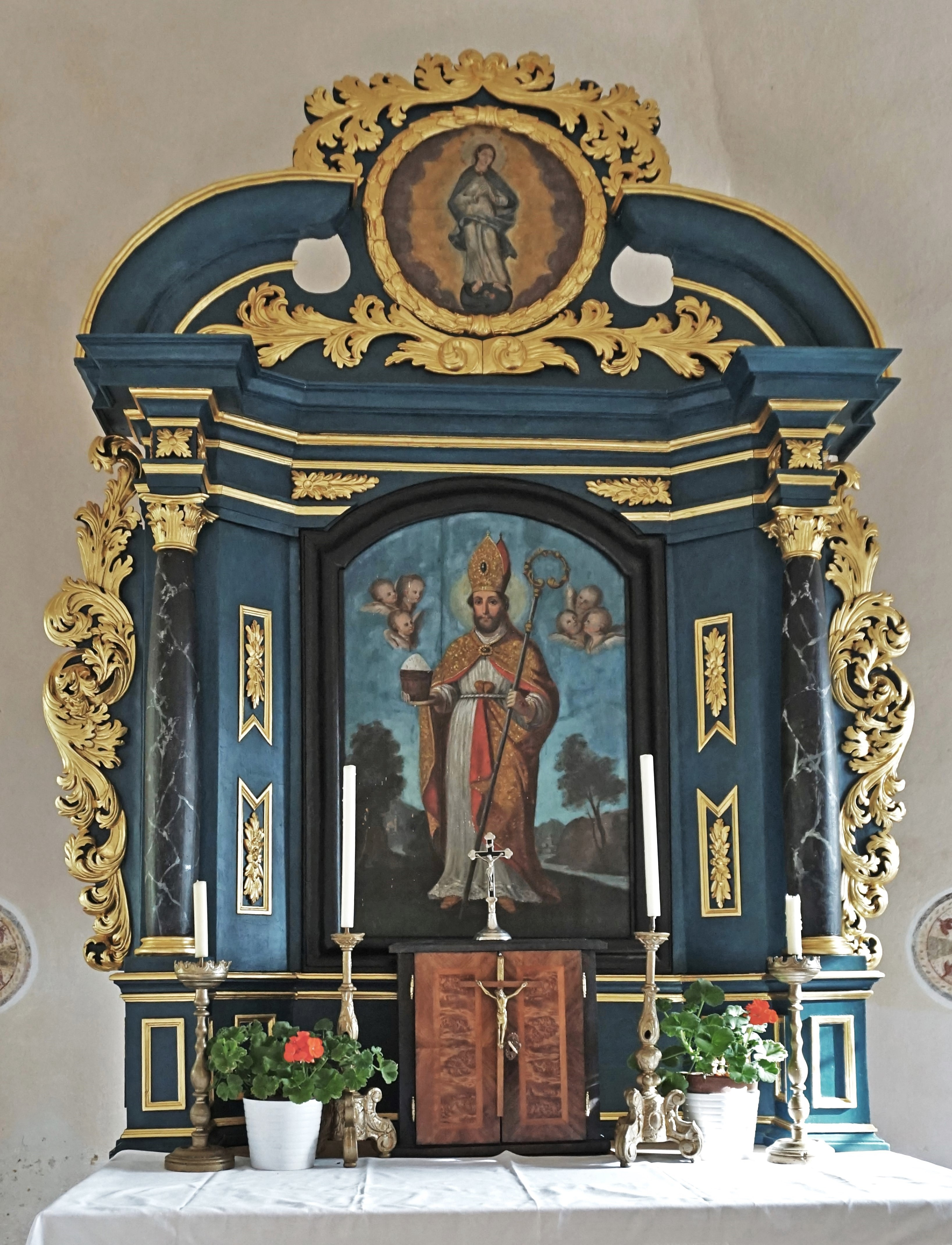 Kath. Filialkirche hl. Rupert, Nußberg (Moosburg), dem hl. Rupert geweihter Hochaltar